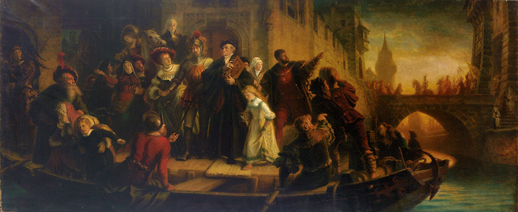 Übergabe der Stadt Konstanz an das Haus Österreich – Die Auswanderung der Reformierten (1548). Entwurf und Vorstudie zum Fresko. Öl auf Leinwand, 87 x 205 cm